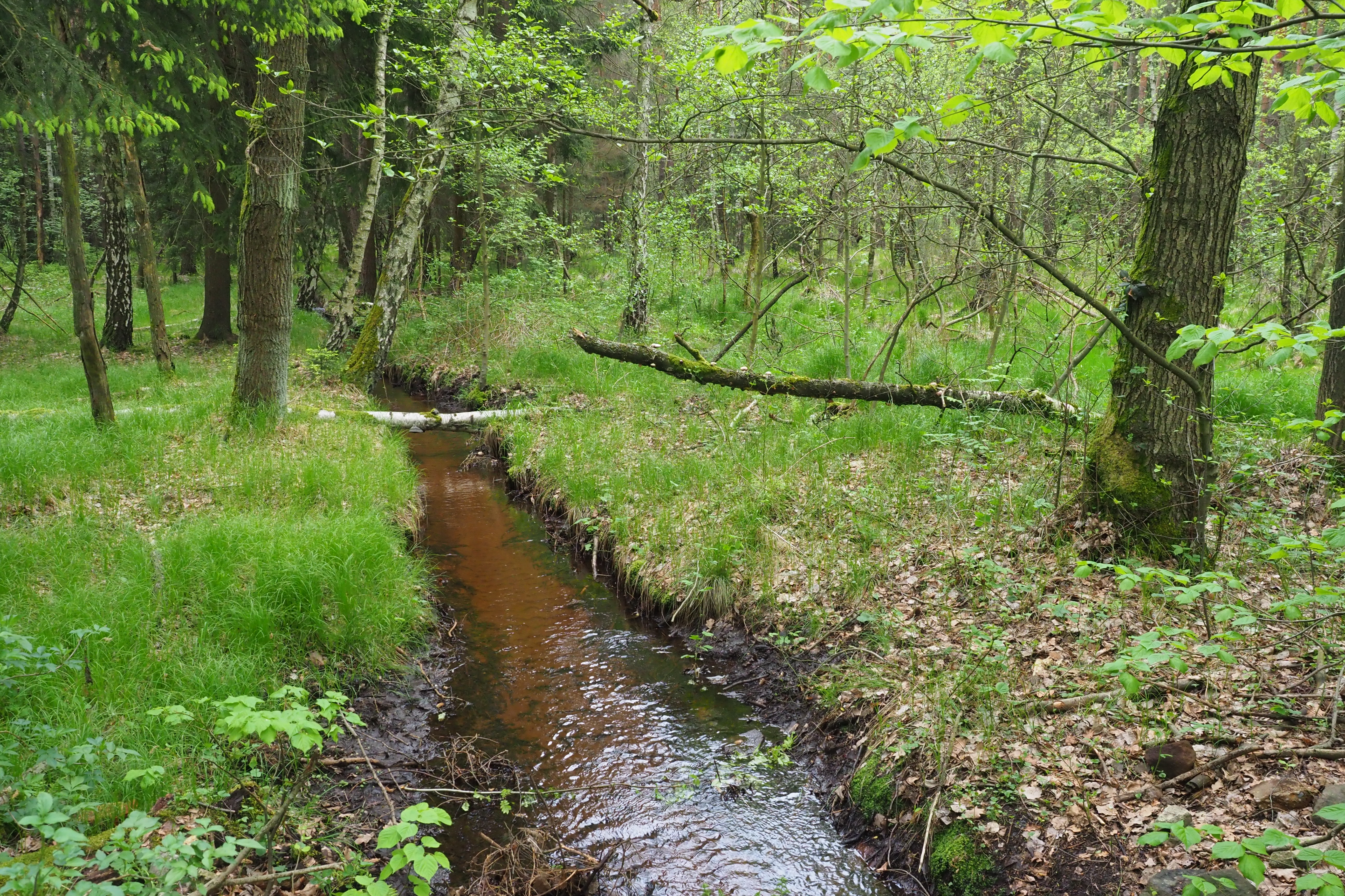 Naturschutzgebiet Moorwald am Pechfluss bei Medingen